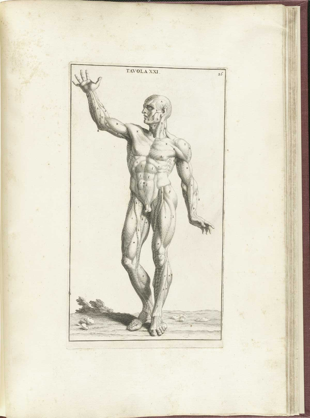 Genga: Anatomia per uso et intelligenza del disegno ricercata non solo su gl'ossi, e muscoli del corpo humano